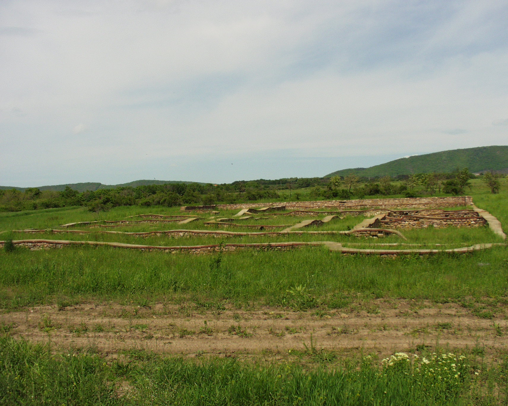 Kővágószőlősi római villa romjai